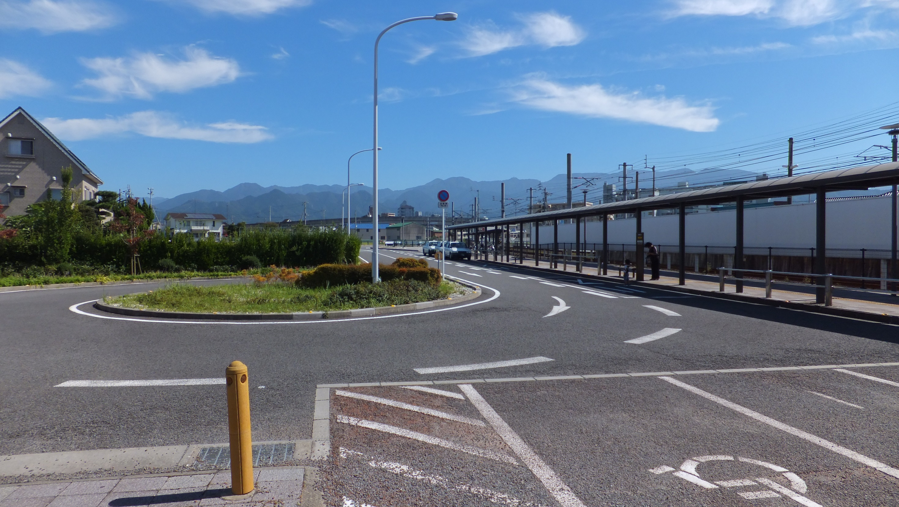 伊予鉄道 横河原線 梅本駅 バス・タクシーのりば（愛媛県松山市）2015年10月